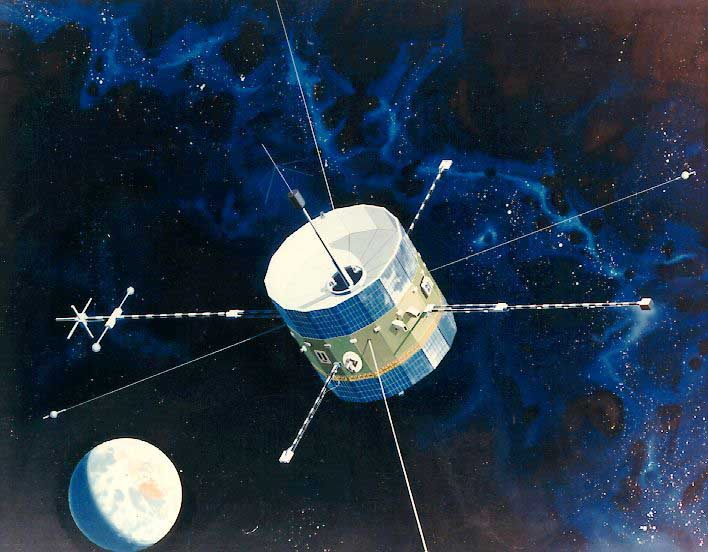 ISEE-1 satellite